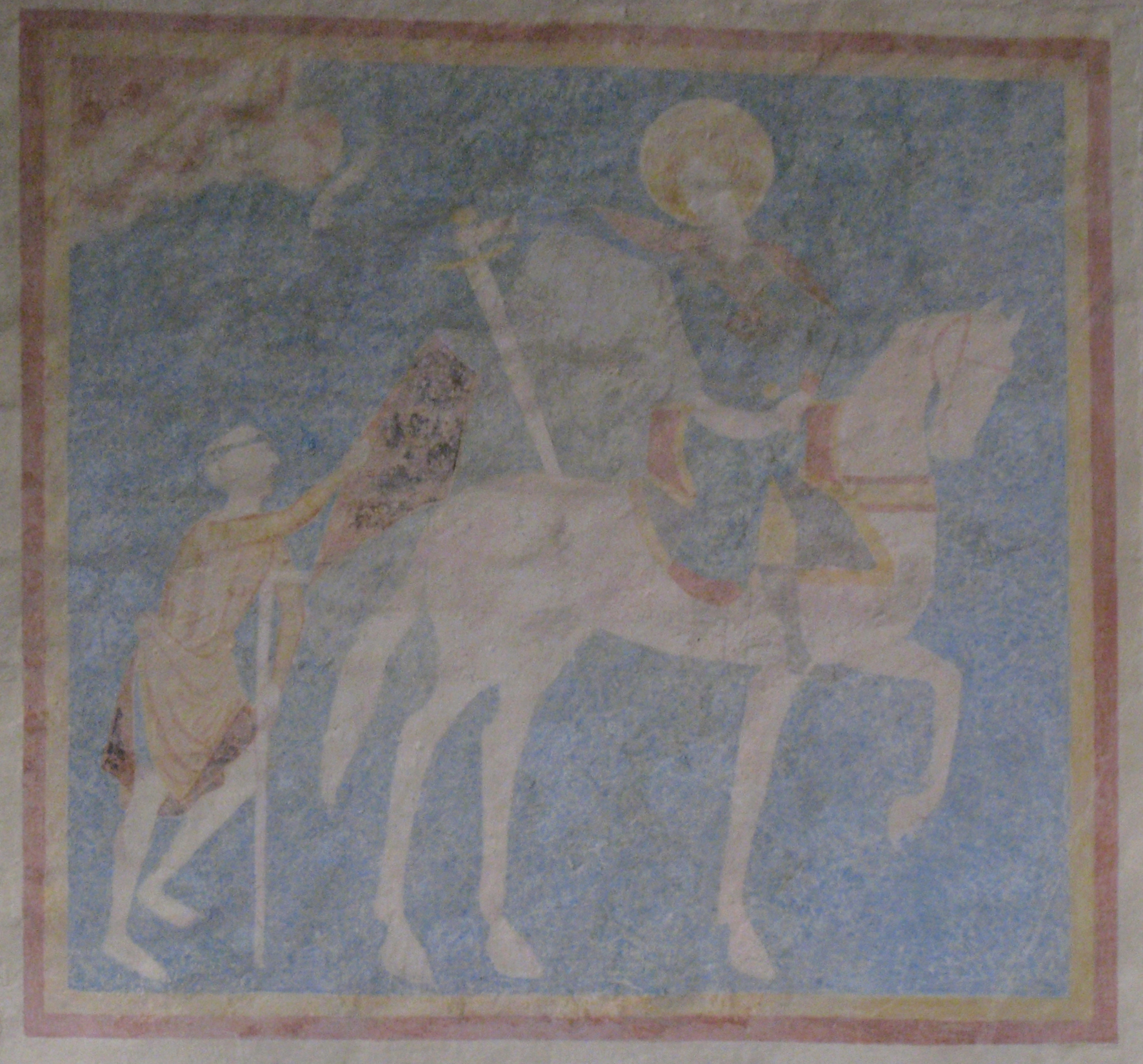 Darstellung des Hl. Martin an der Nordwand des Mittelschiffes, etwa vor 1400This is a photograph of an architectural monument.